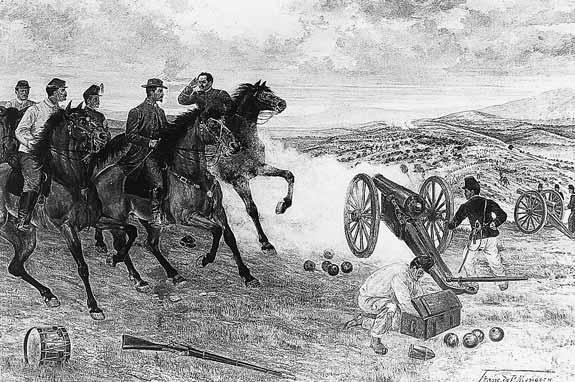 Cuadro de Francisco de P. Mendoza de La Batalla de la Carbonera fue librada el 18 de octubre de 1866, durante la Segunda Intervención Francesa en México.